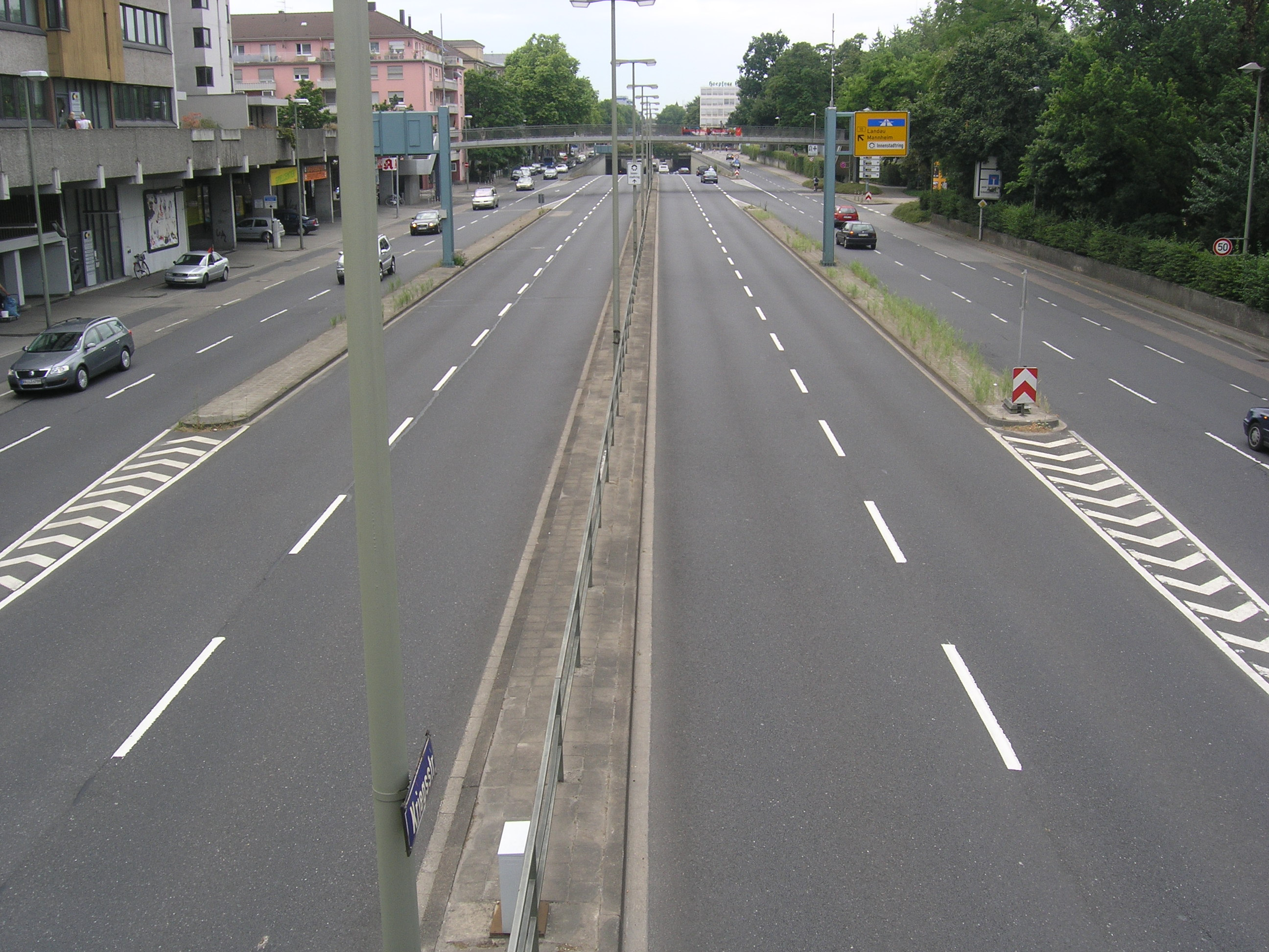 Kriegsstraße in Karlsruhe, Ortsdurchfahrt der Bundesstraße 10